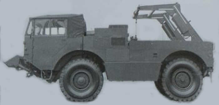 Faun Artillerie-Geräteträger 8/15